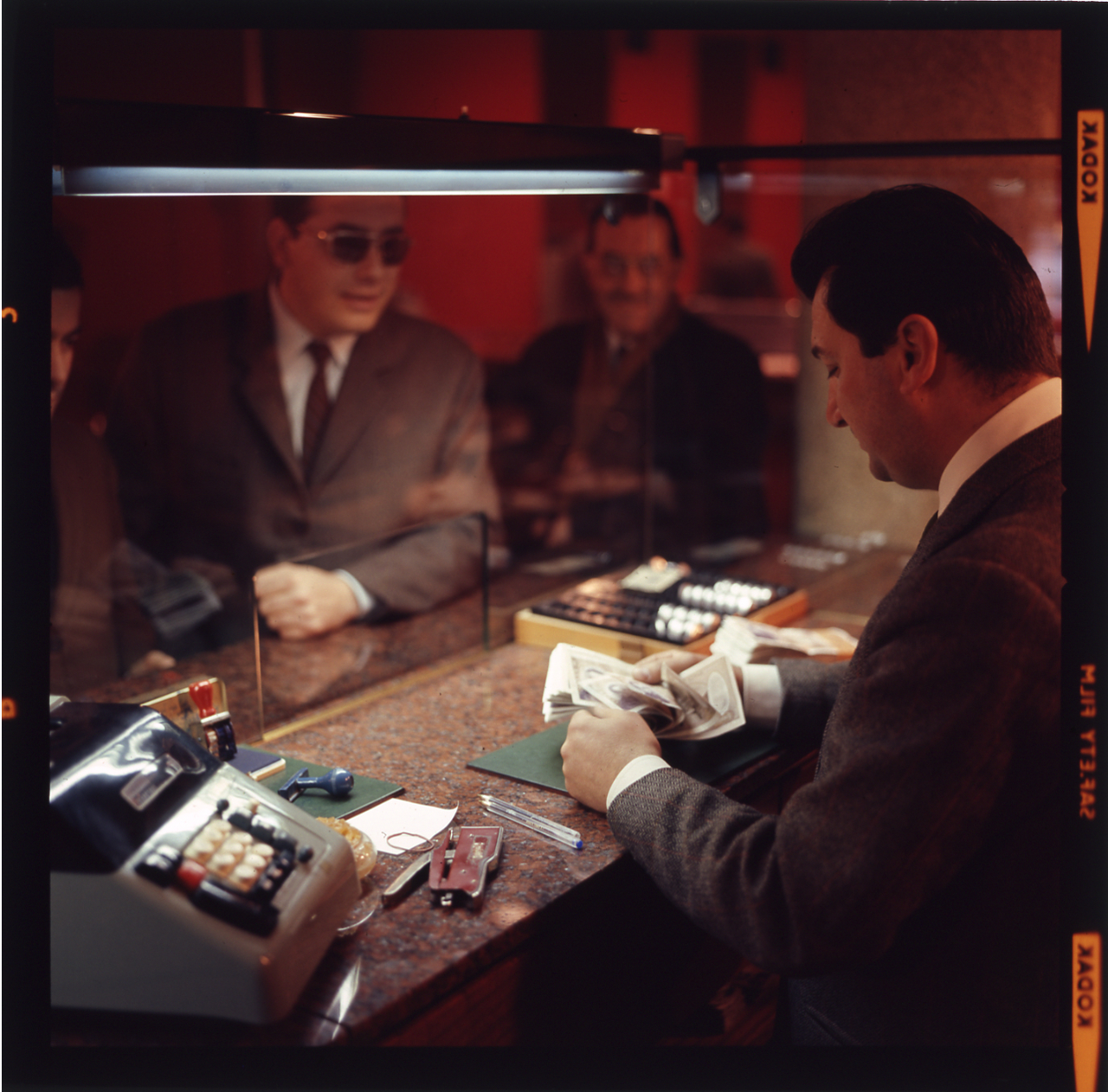 Serie fotografica : Italia, 1970 / Paolo Monti. - Buste: 7, Fototipi: 7 : Diapositiva, sviluppo cromogeno/ pellicola ; 6x6. - ((Serie costituita da 7 buste di diapositive identificate con i nn.: 2855, 2856, 2857, 2858, 2859, 2860, 2861, e tenute insieme da una graffetta. . - La busta RC 2855 riporta l'iscrizione: "Cassiere/ di banca".